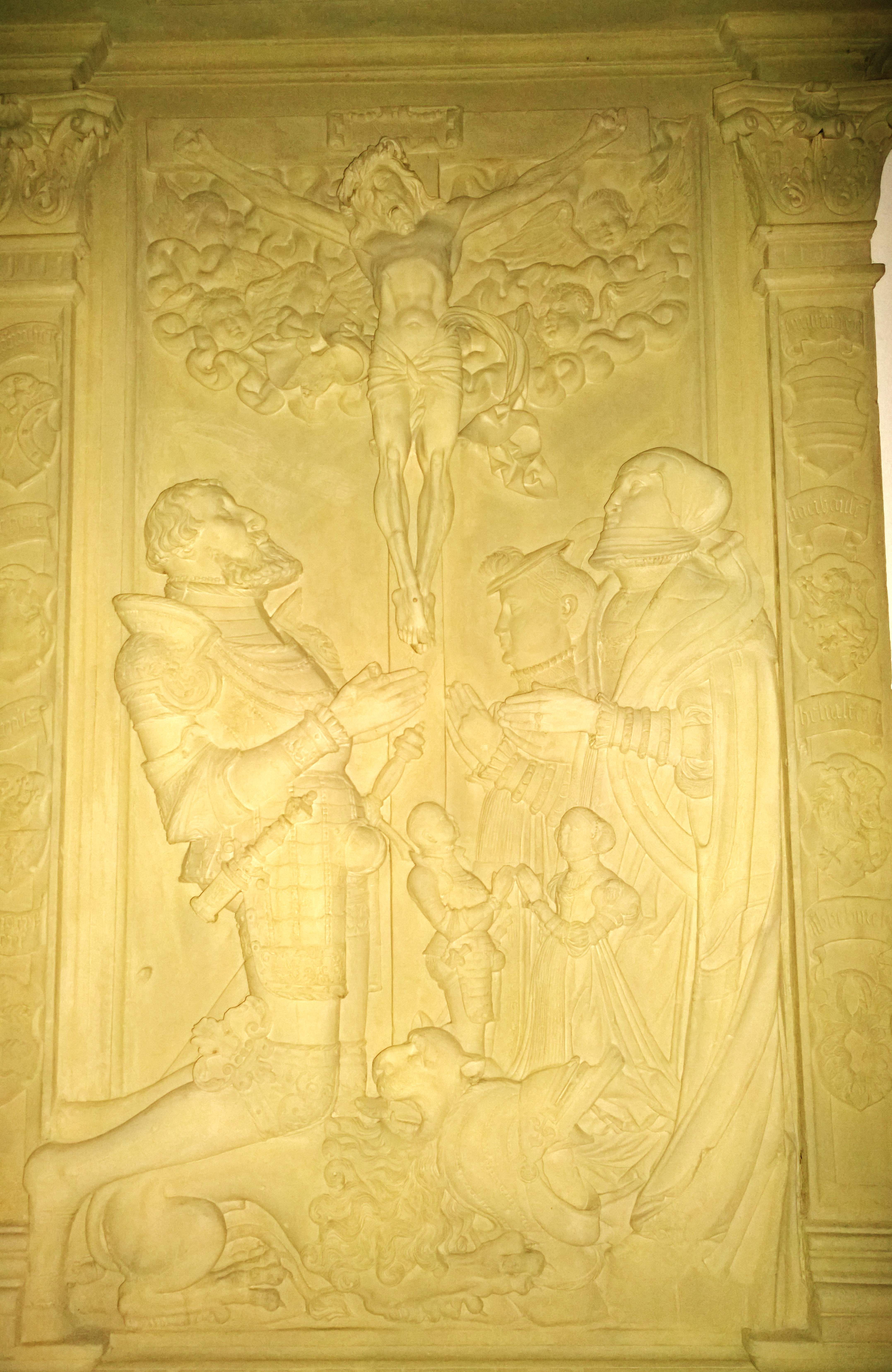 Zentralbild des Paares auf dem Epitaph: Jacob von Praunheim und Anna von Gemmingen in der Kirche in Großwallstadt (östliche Kirchenwand - Mainseite)